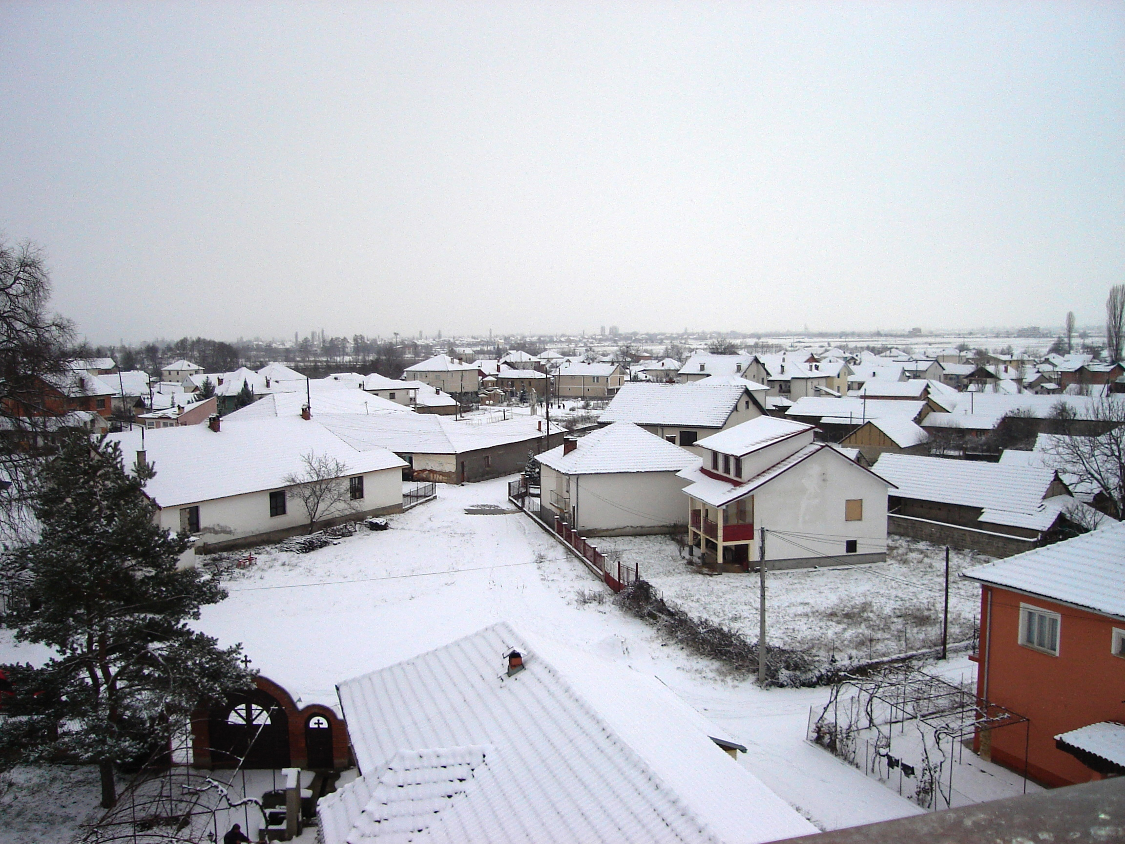 Село Лъжани, Стружко, през зимата.